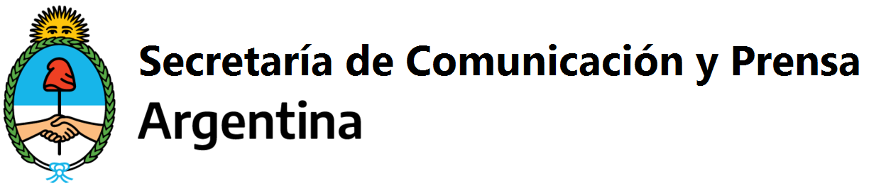 Secretaría de Comunicación y Prensa